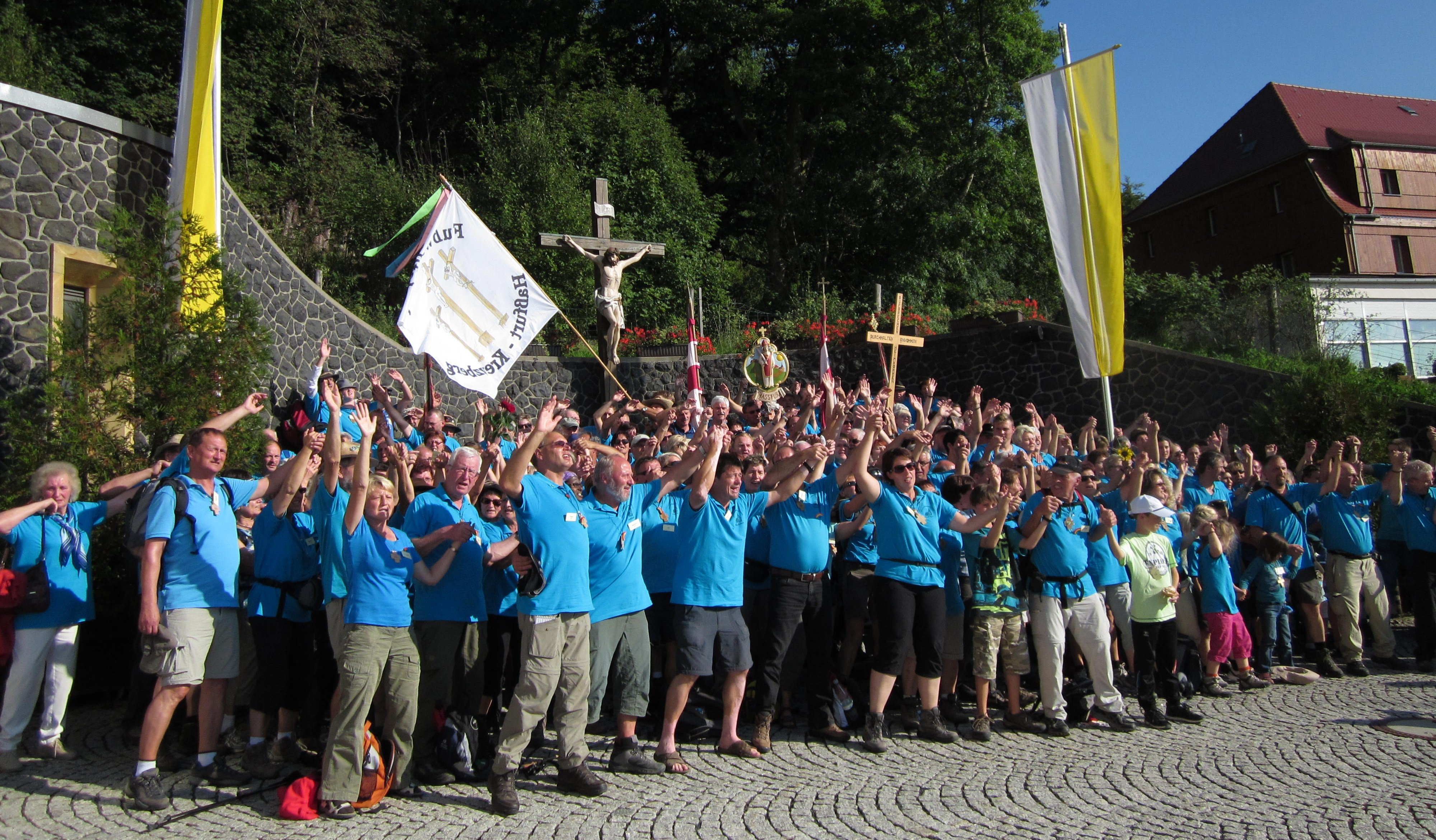 Ankunft einer Wallfahrergruppe auf dem Kreuzberg (Haßfurt 2012)